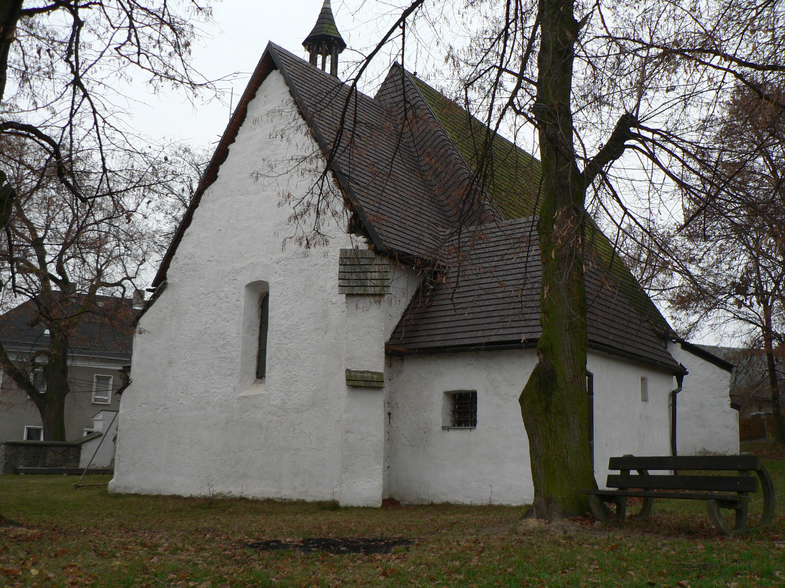 Kostel Všech svatých (Vyšehorky)